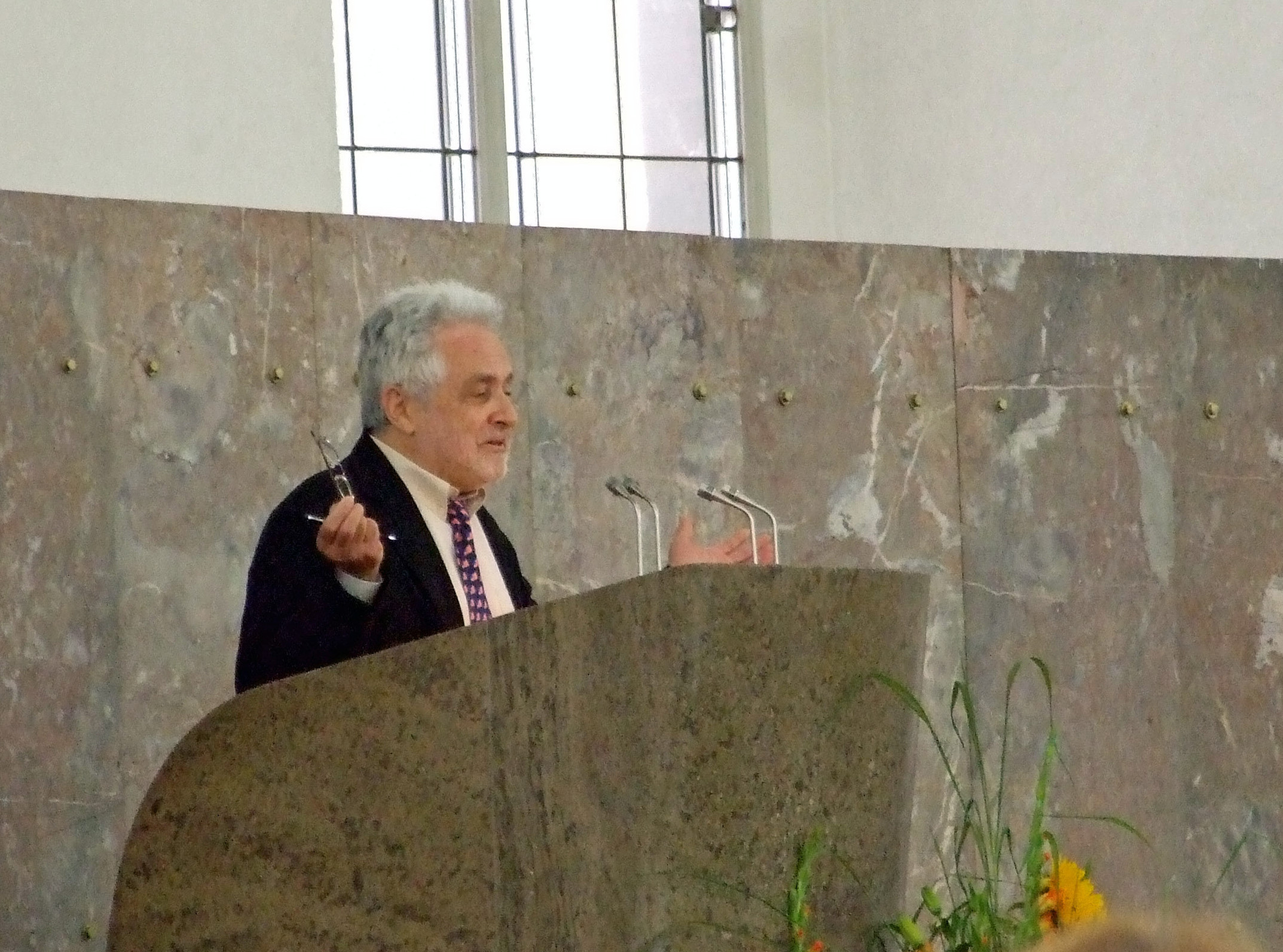 Henryk M. Broder, bei seiner (Dankes-)Rede in der Paulskirche 2007